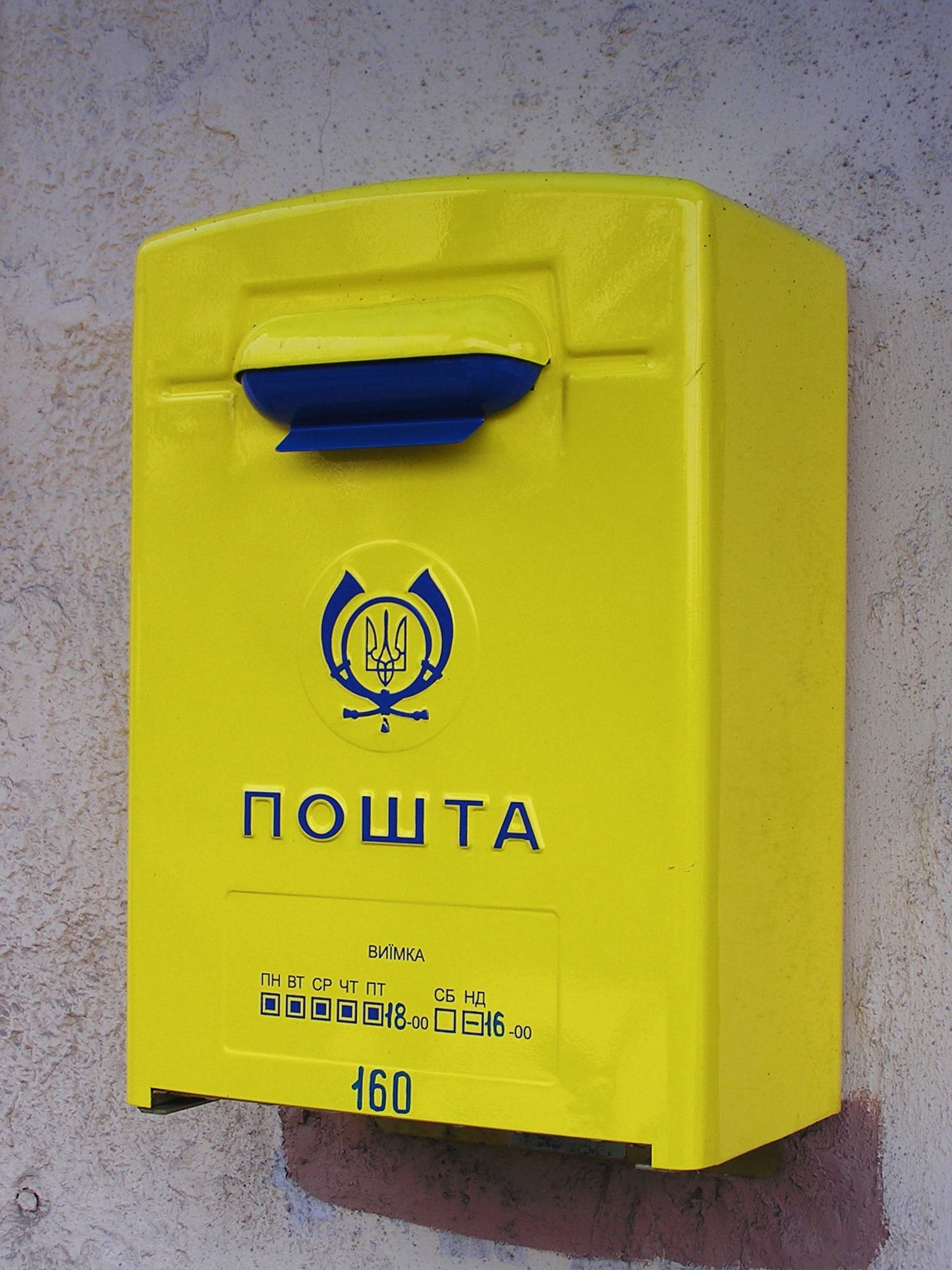 Донецк. Почтовый ящик.